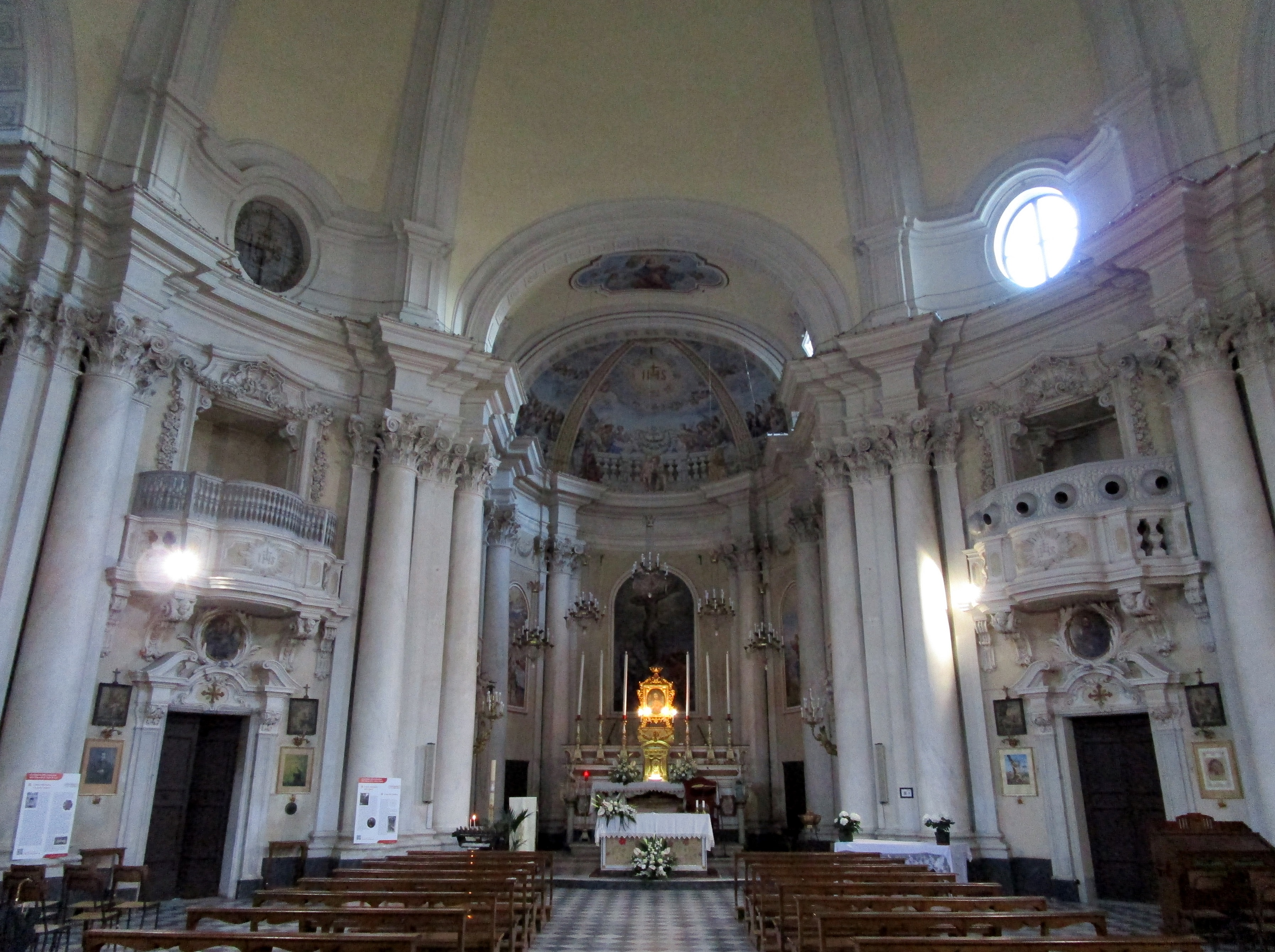 Montepulciano, interno della chiesa del Gesù